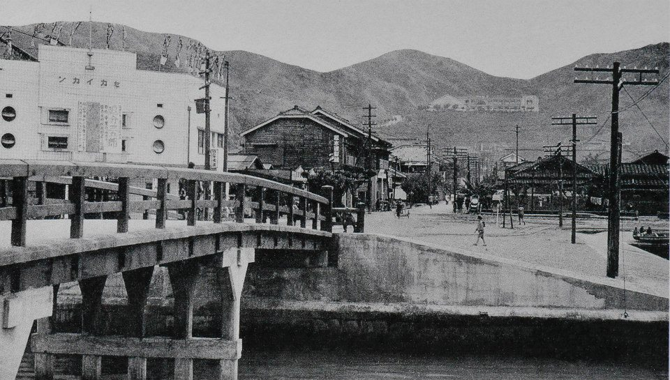 台灣日治時代的基隆天神町，攝於1936年1月23日